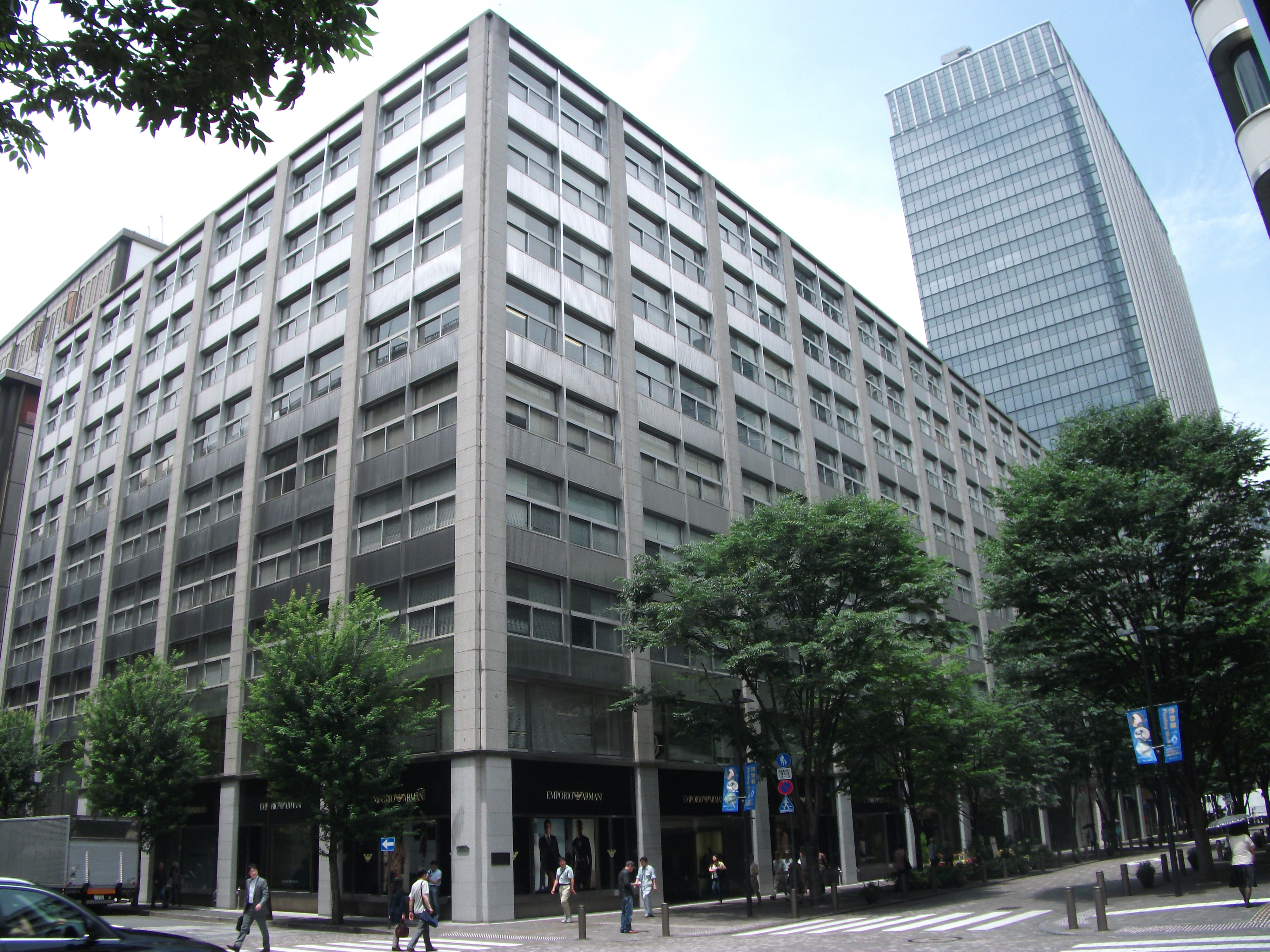 東京・丸の内、富士ビルヂング